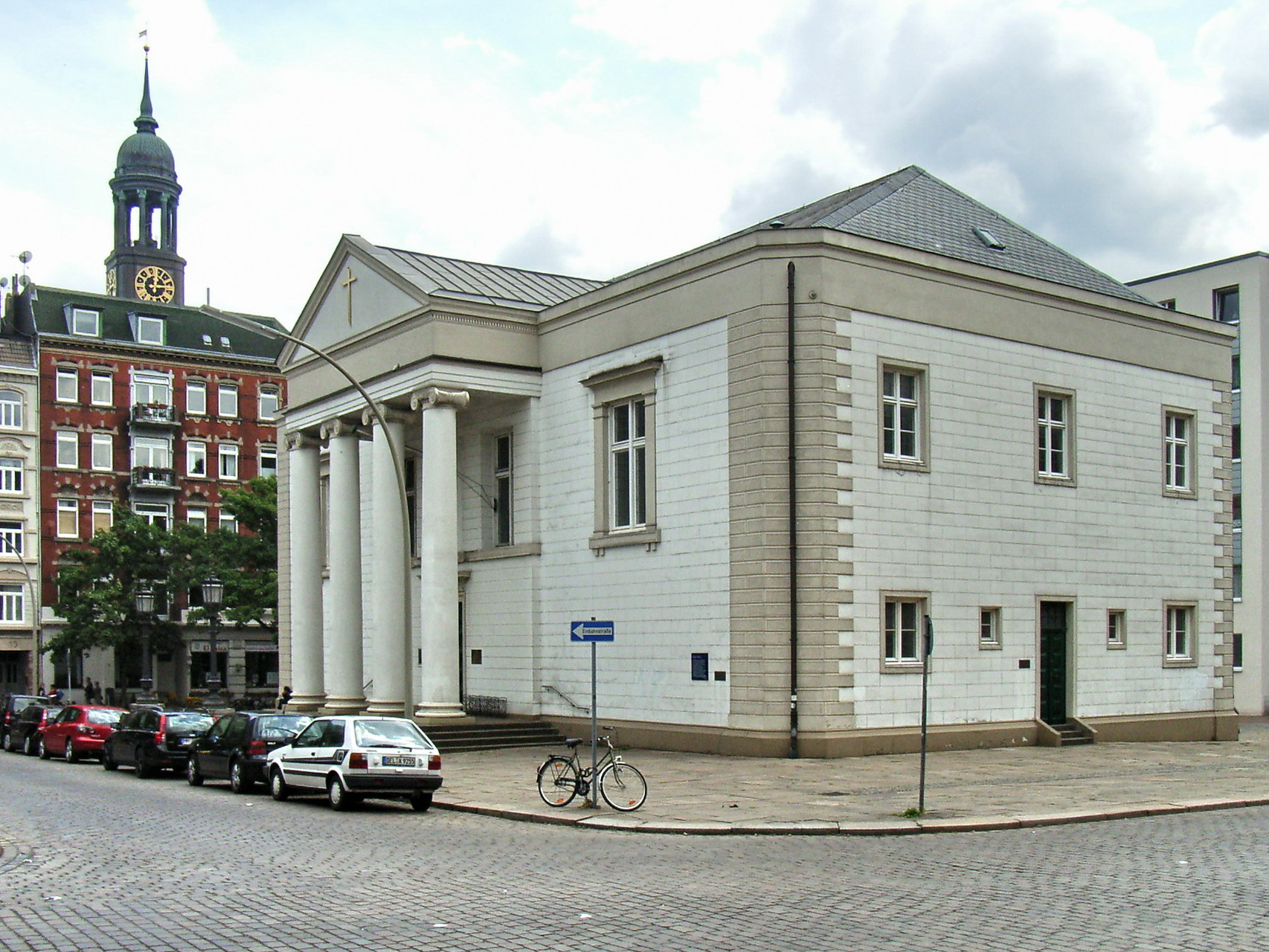 Der Bau, vom Altonaer Architekten Ole Jørgen Schmidt, Schüler von C. F. Hansen an der Kopenhagener Akademie, ist als Saalbau mit flachgedecktem Innenraum und umlaufender Säulenempore der reinste klassizistische Kirchenbau im Hamburger Stadtgebiet.